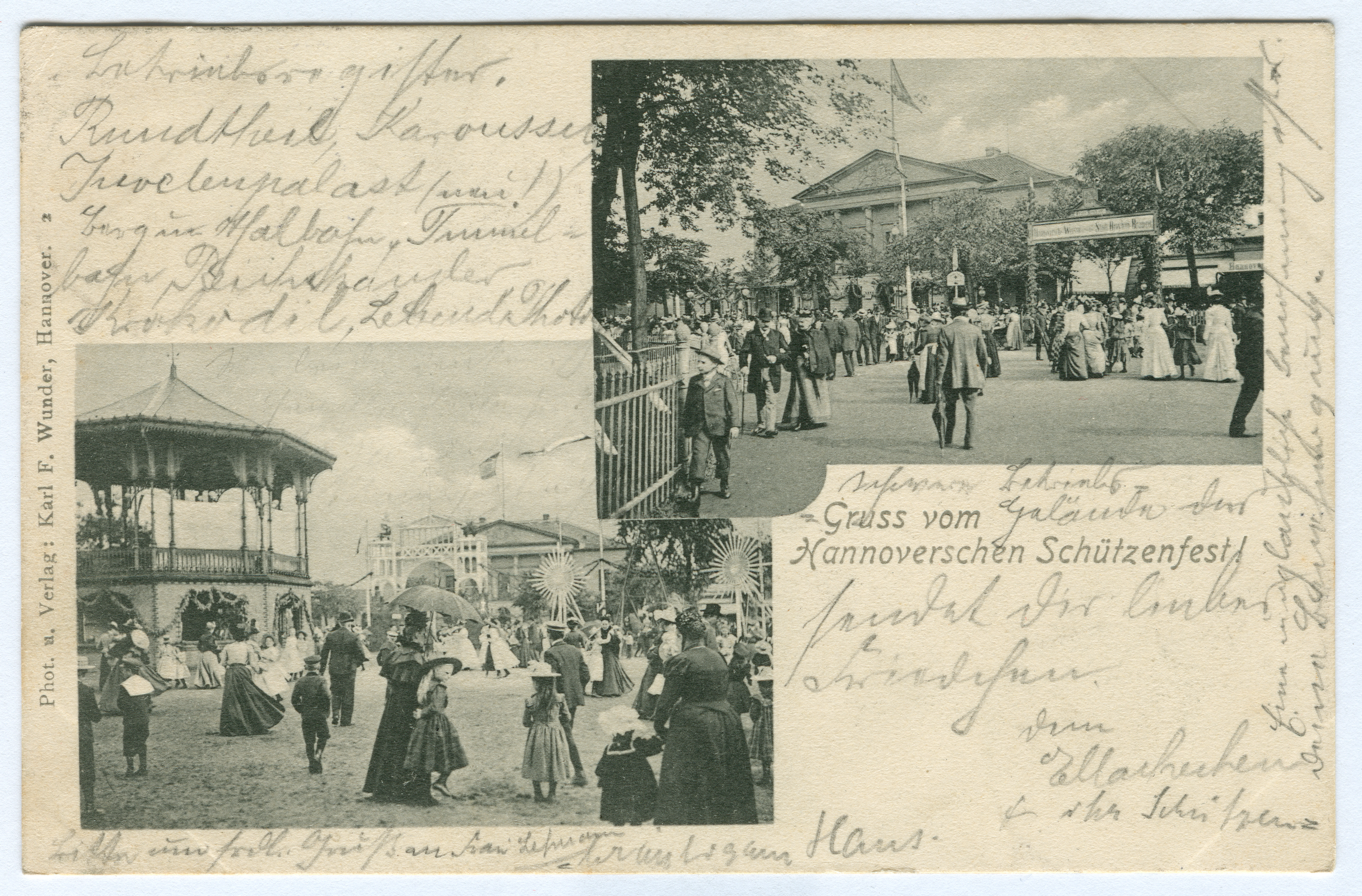 „Phot. u. Verlag v. Karl F. Wunder, Hannover. 2 – Gruss vom Hannoverschen Schützenfest“